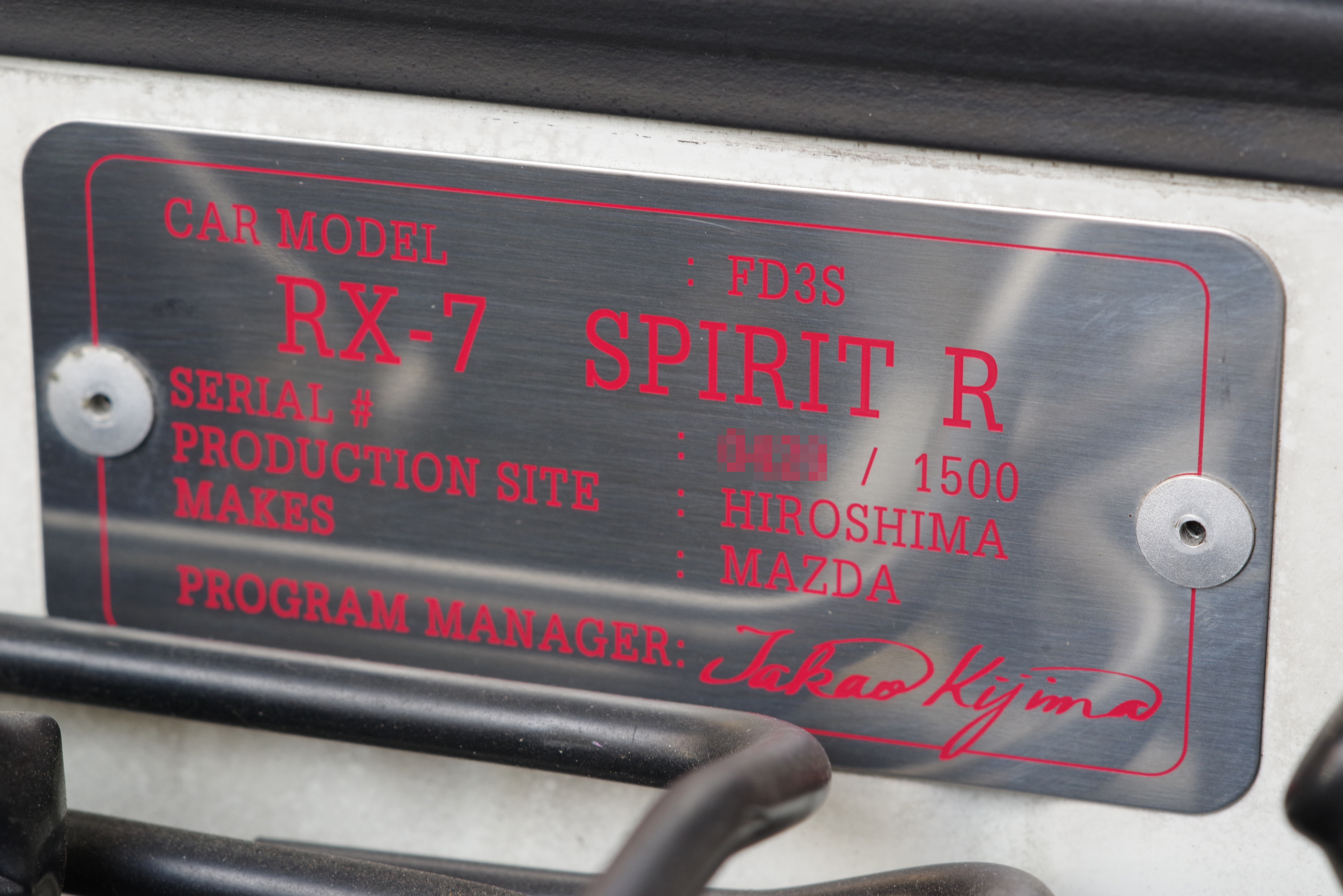 RX-7 Spirit Rのシリアルナンバープレート